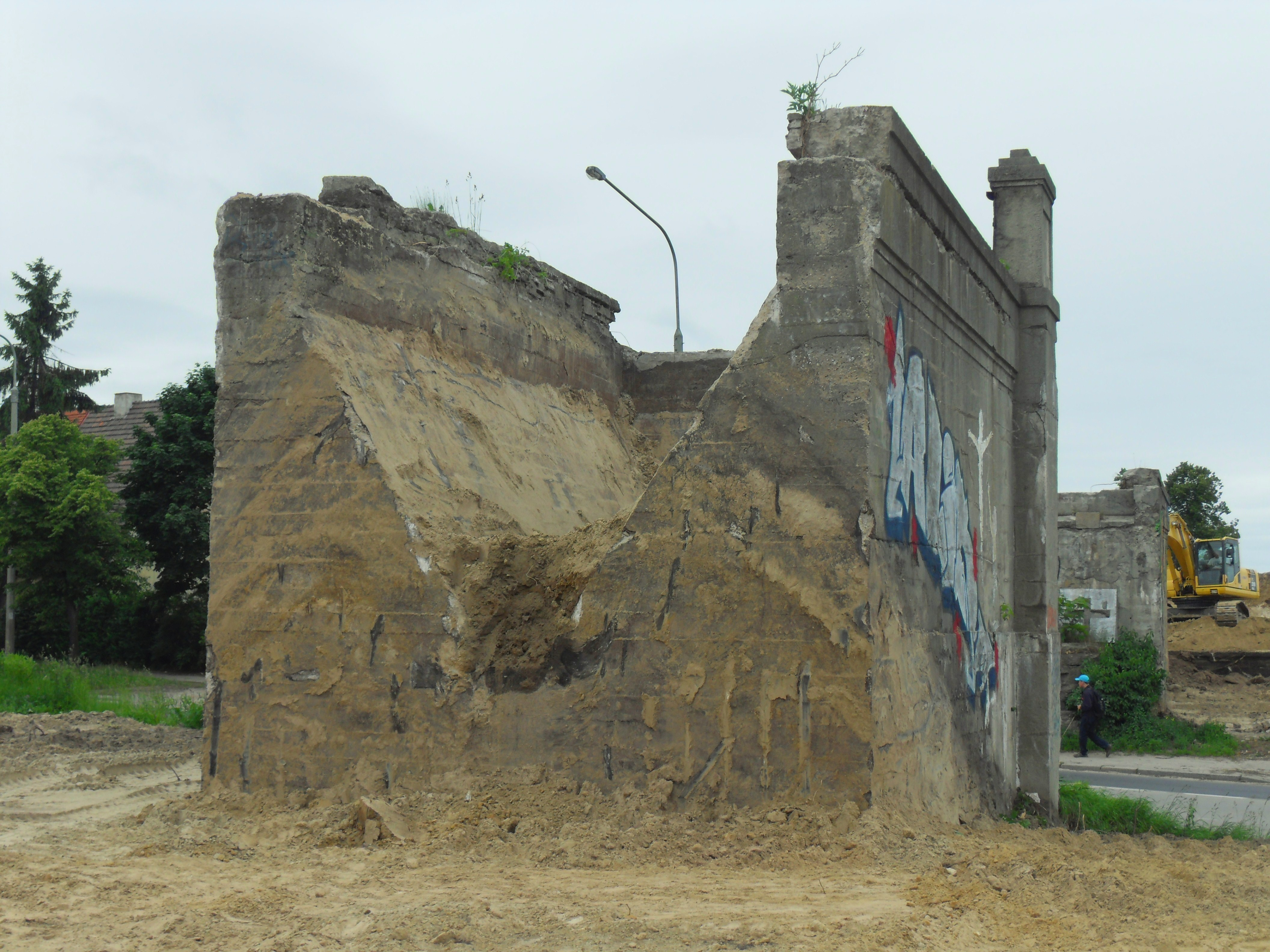 Gdańsk, wyburzanie wiaduktu nad ciągiem ul. Polanki i ul. Chrzanowskiego.